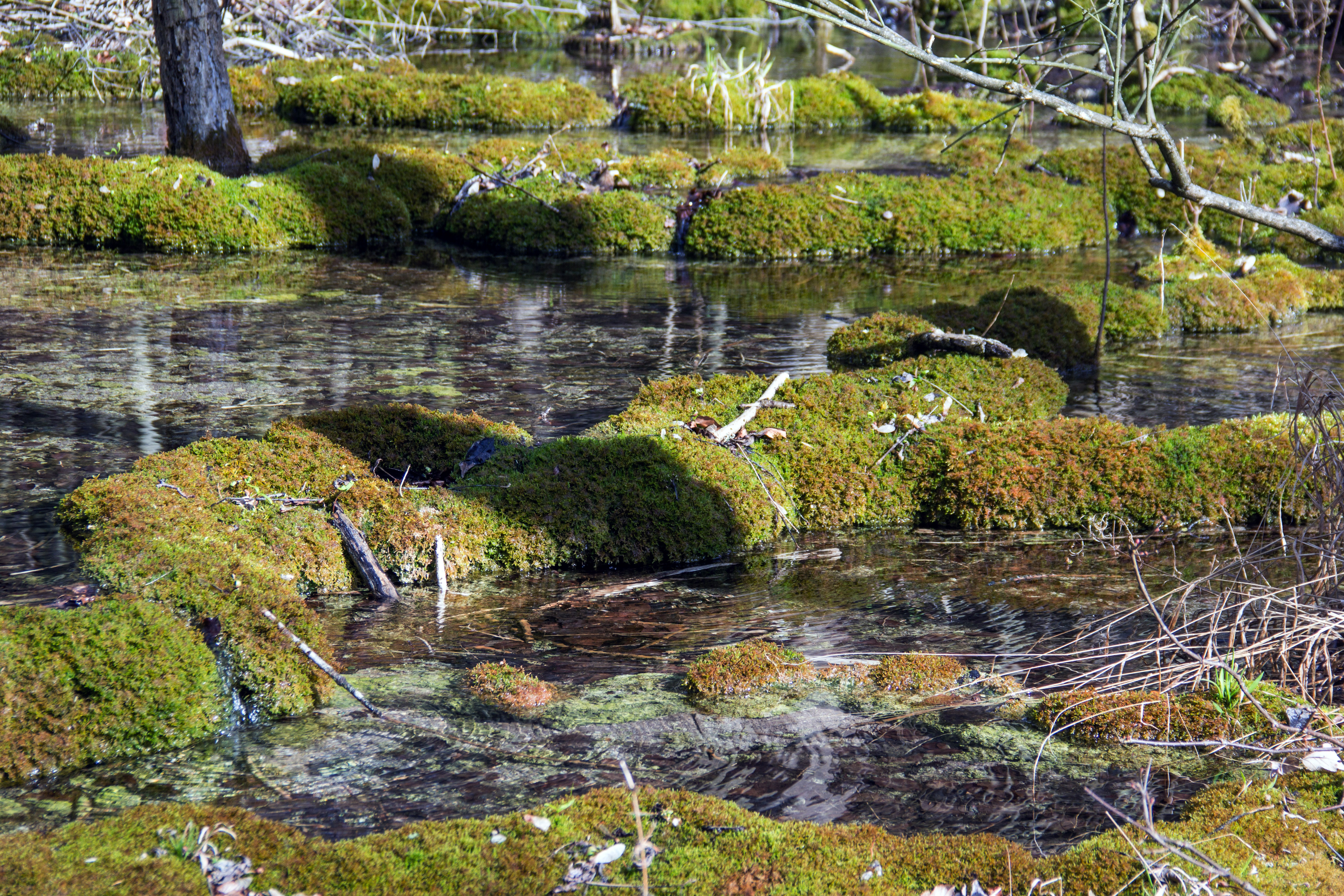 Sinterterrassen im Heinrichsgraben, Geotop